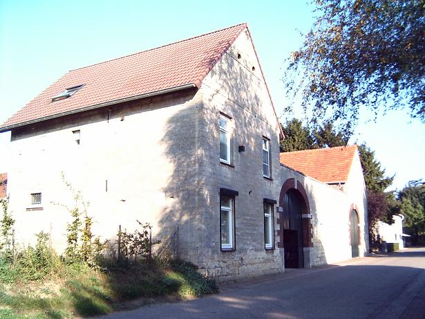 Limburgs: Mergelhaof in 't Roeët ('t Rooth)